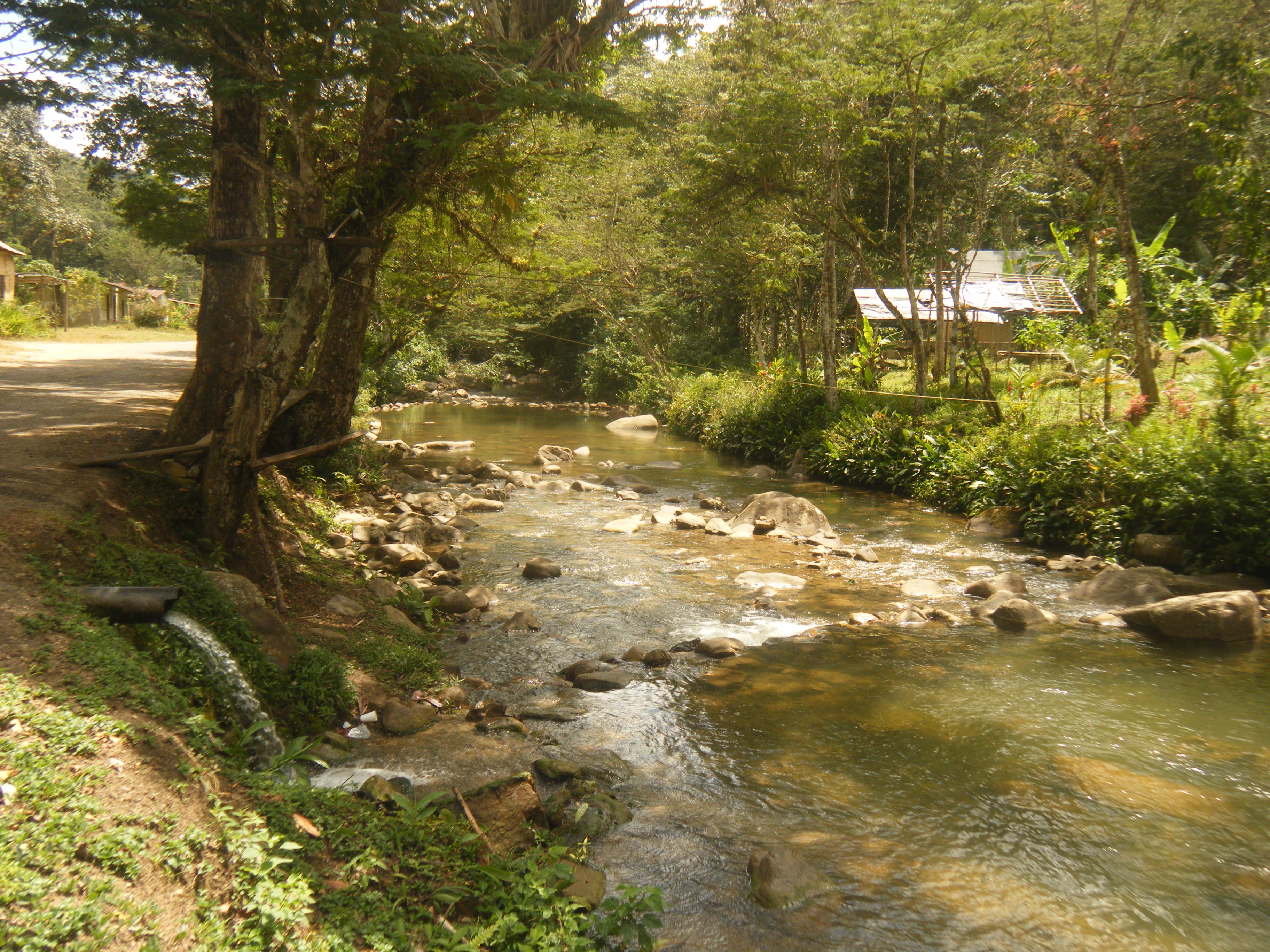 Rio cerca de las Pozas de Lorenzo, Caripe, Estado Monagas. Posiblemente Río Colorado.